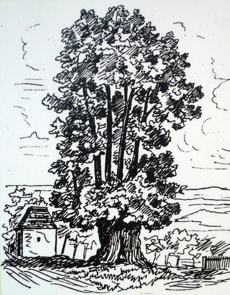 Schmorsdorfer Linde